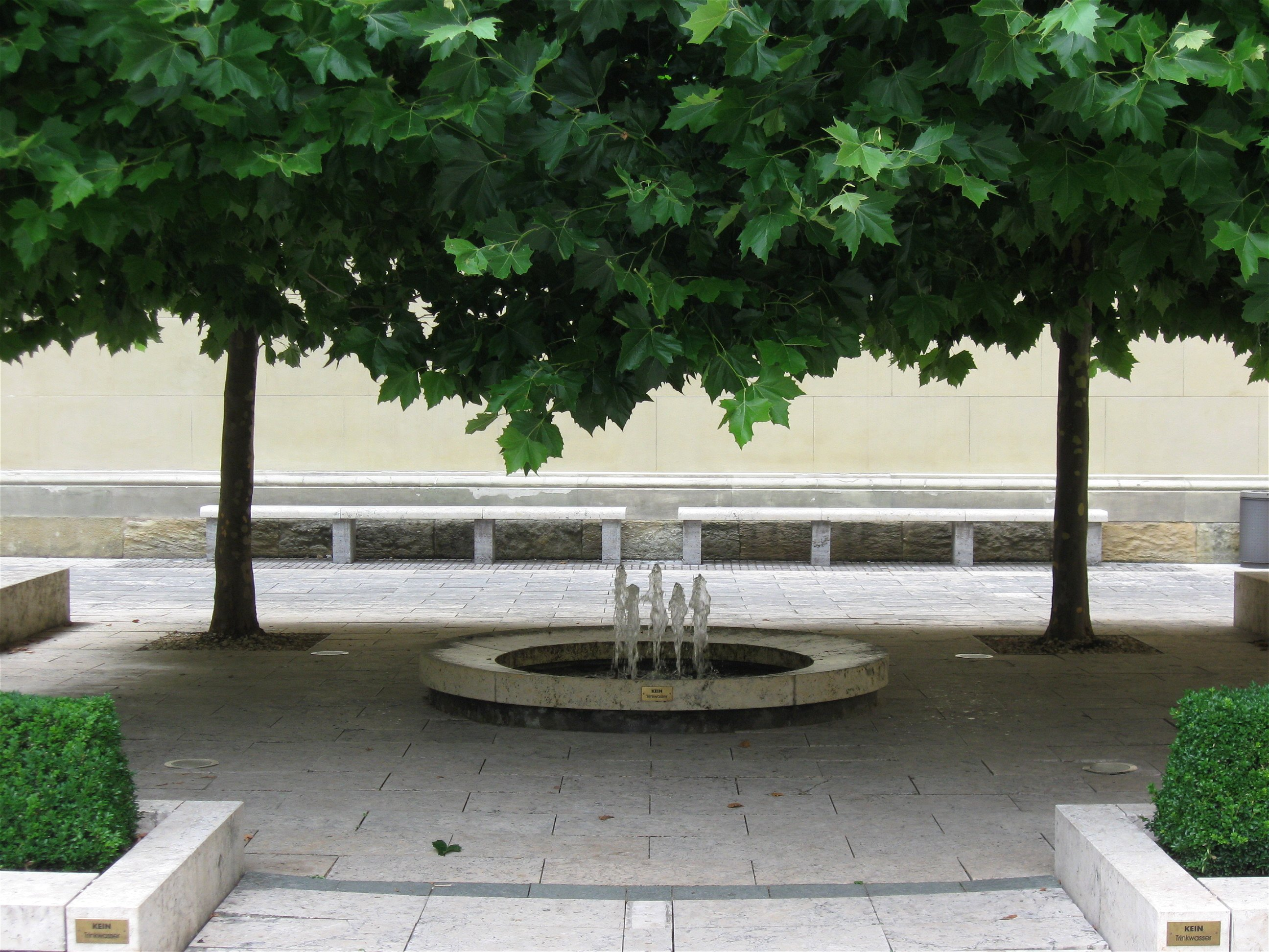 Brunnen im Kabinettsgarten der Münchener Residenz